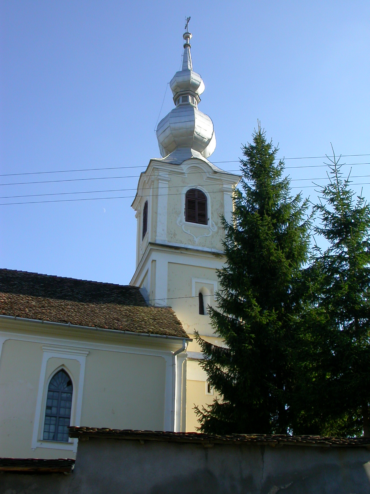 Biserica romano-catolică și turnul-clopotniță, sec. XV, transf. 1857